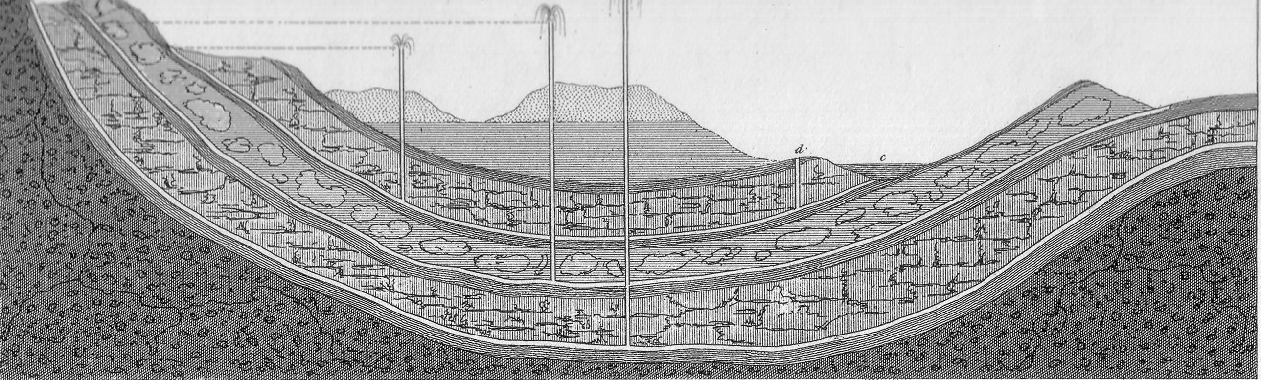 באר ארטזית, חתך. האנציקלופדיה האיקונוגרפית של מדע, ספרות ואמנות 1851